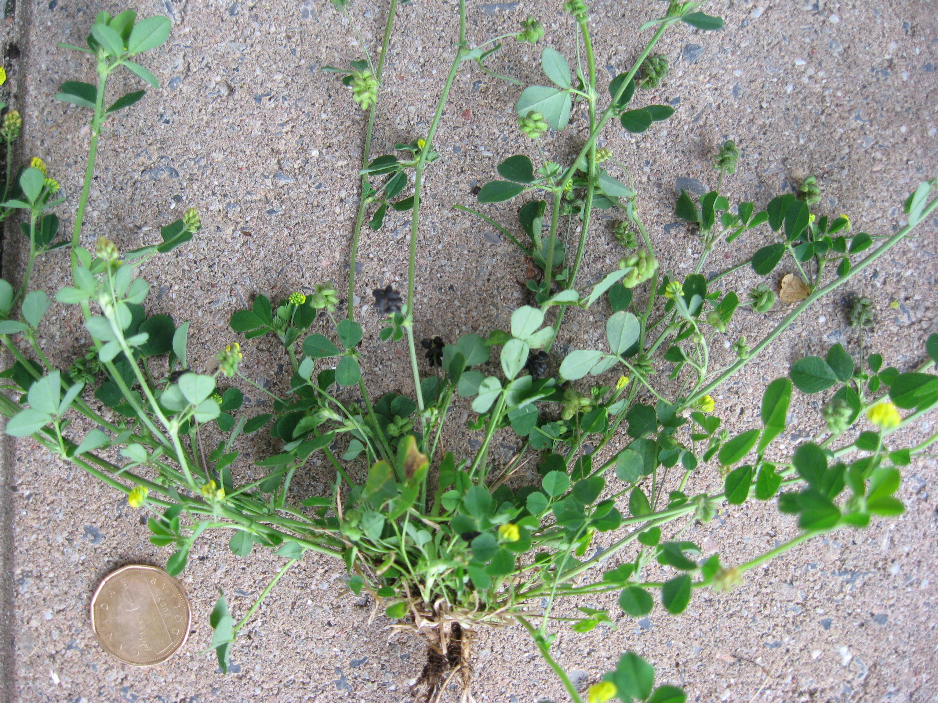 أوراق و ثمار نبات فصة سوداء As per Google, "Leaves and the fruits of Medicago lupulina" An entire uprooted plant; note the distinctive seed pod clusters (black when ripe, green when unripe). For size comparison, compare to the Canadian 1 dollar coin in the lower left which measures 26.5 mm (slightly over one inch) in diameter.